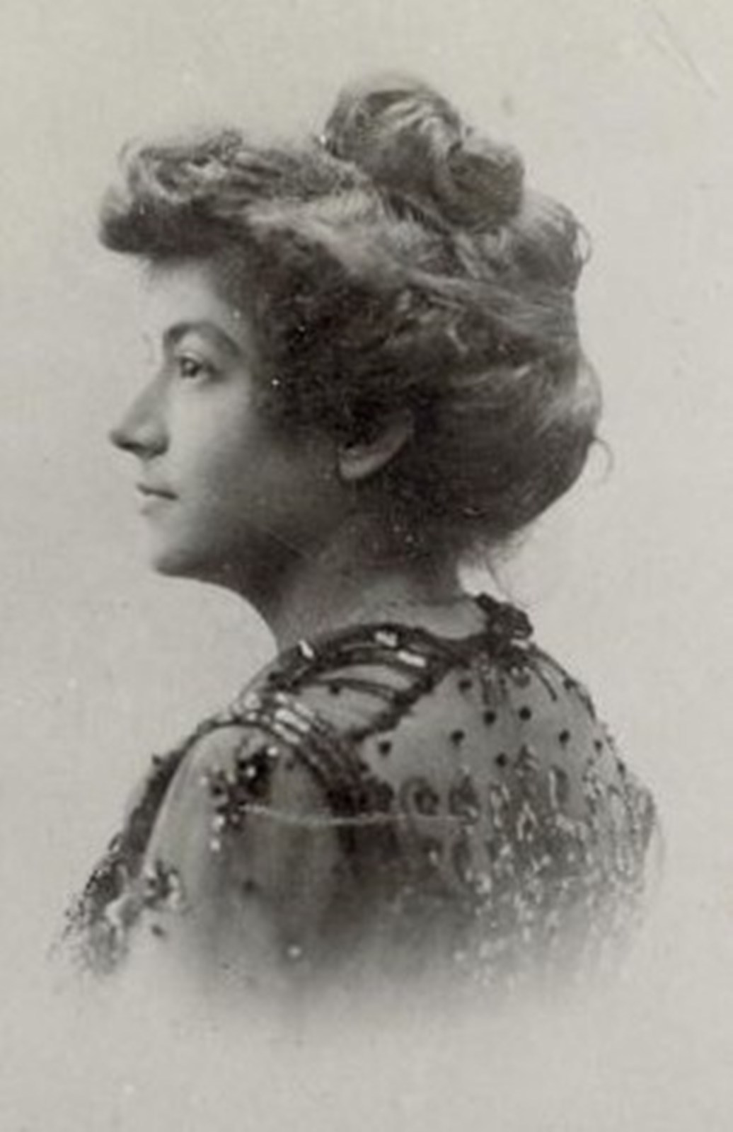 Portrait de Gabrielle, Jeanne Lucile Dudevant-Sand (1868-1909). Elle est la petite-fille de la romancière George Sand.